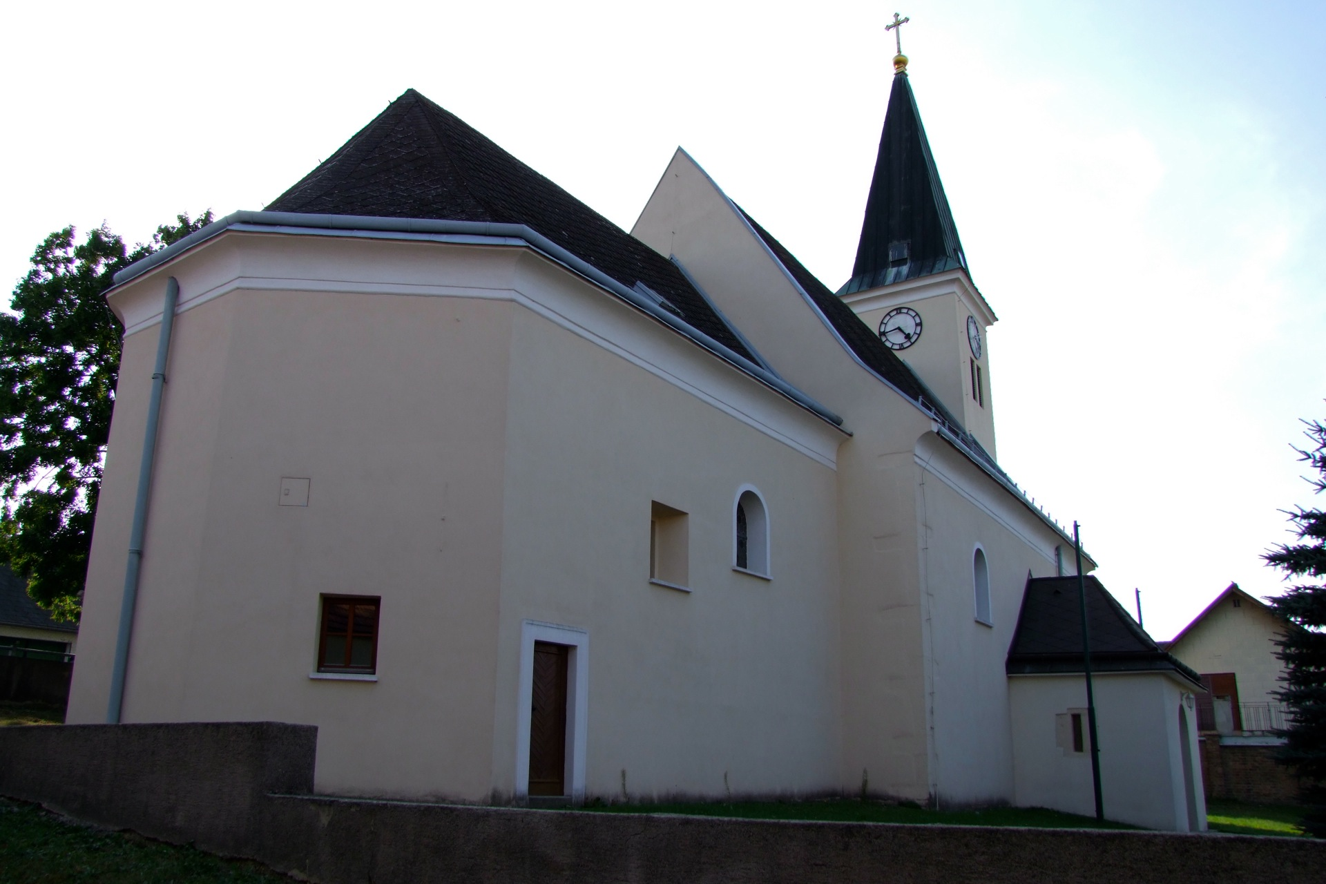 Kath. Filialkirche hl. Leonhard